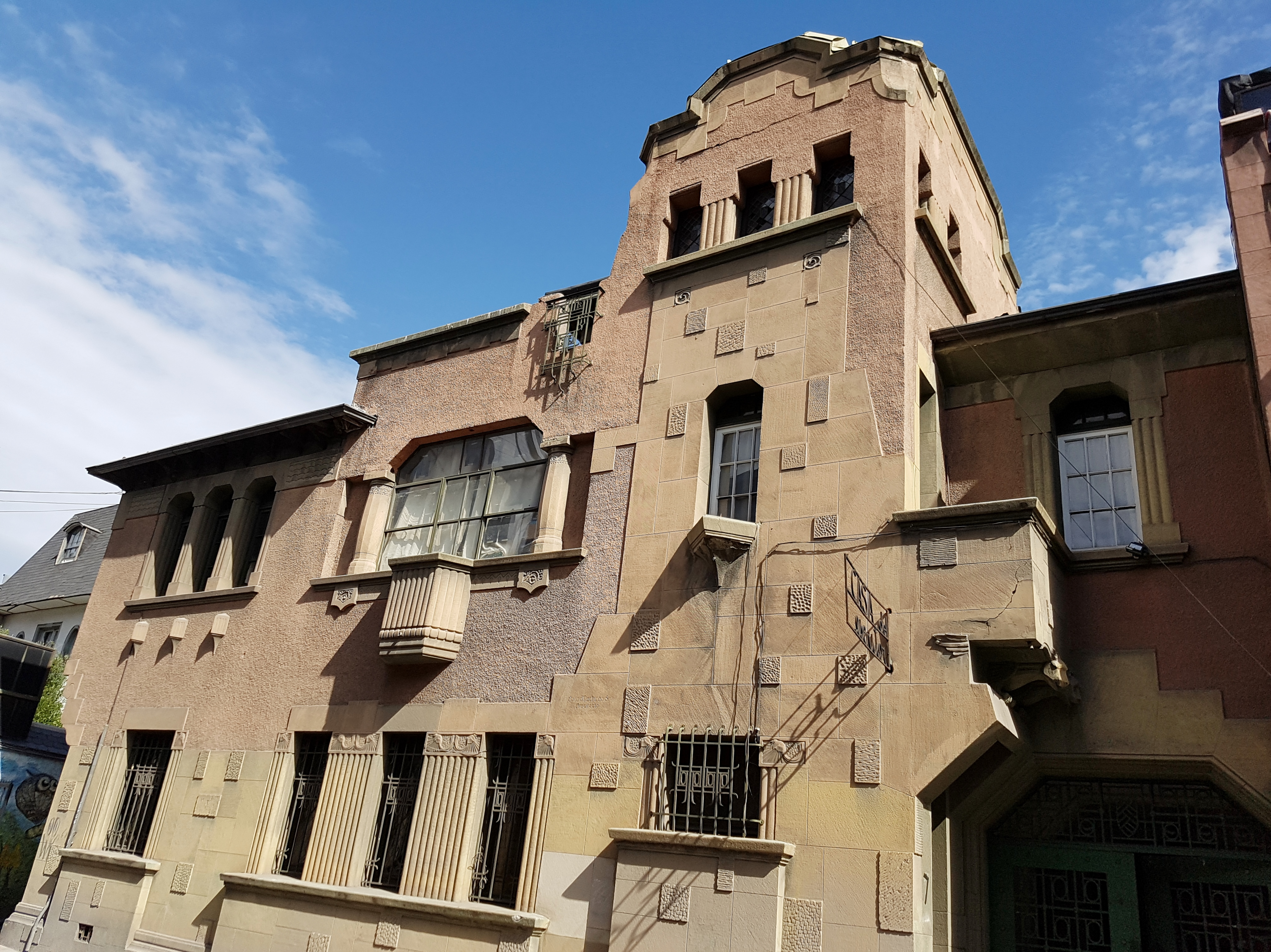 La Casa del Escritor, sede de la Sociedad de Escritores de Chile (SECH); declarada Monumento Histórico en 2009. Está ubicada en Almirante Simpson 7, comuna de Providencia, Santiago de Chile.